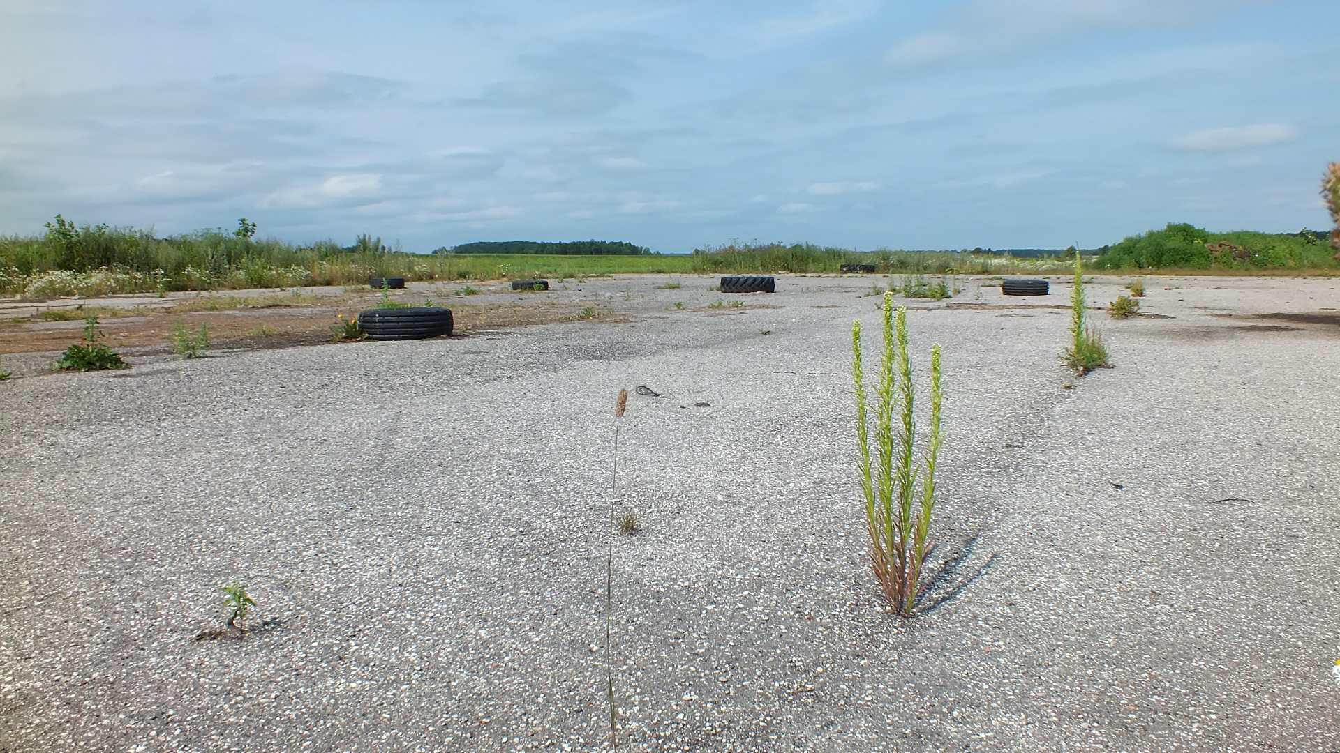 Slampes lidlauka perons